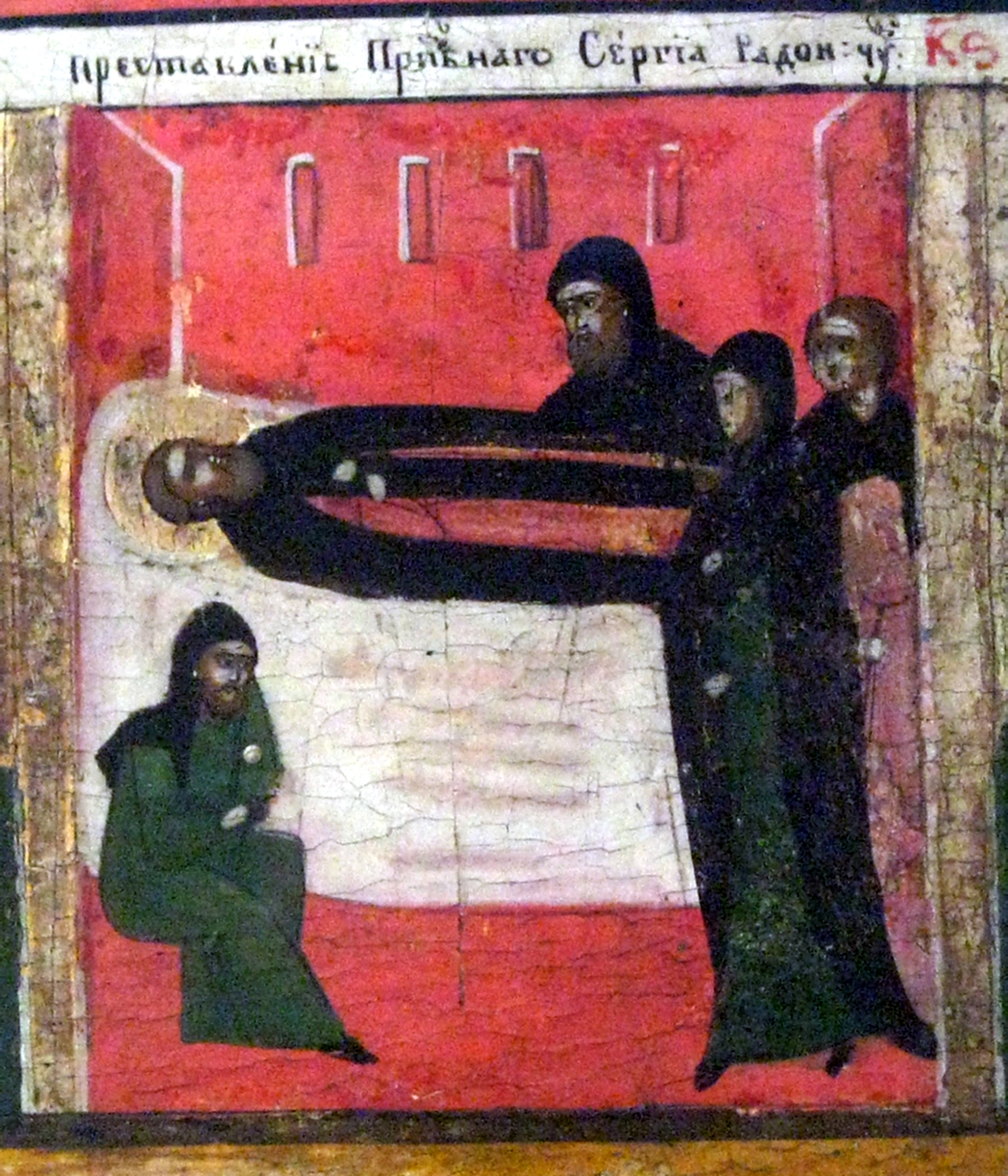 Минея. Сентябрь. Деталь: Преставление преподобного Сергия Радонежского (Ферапонтов)